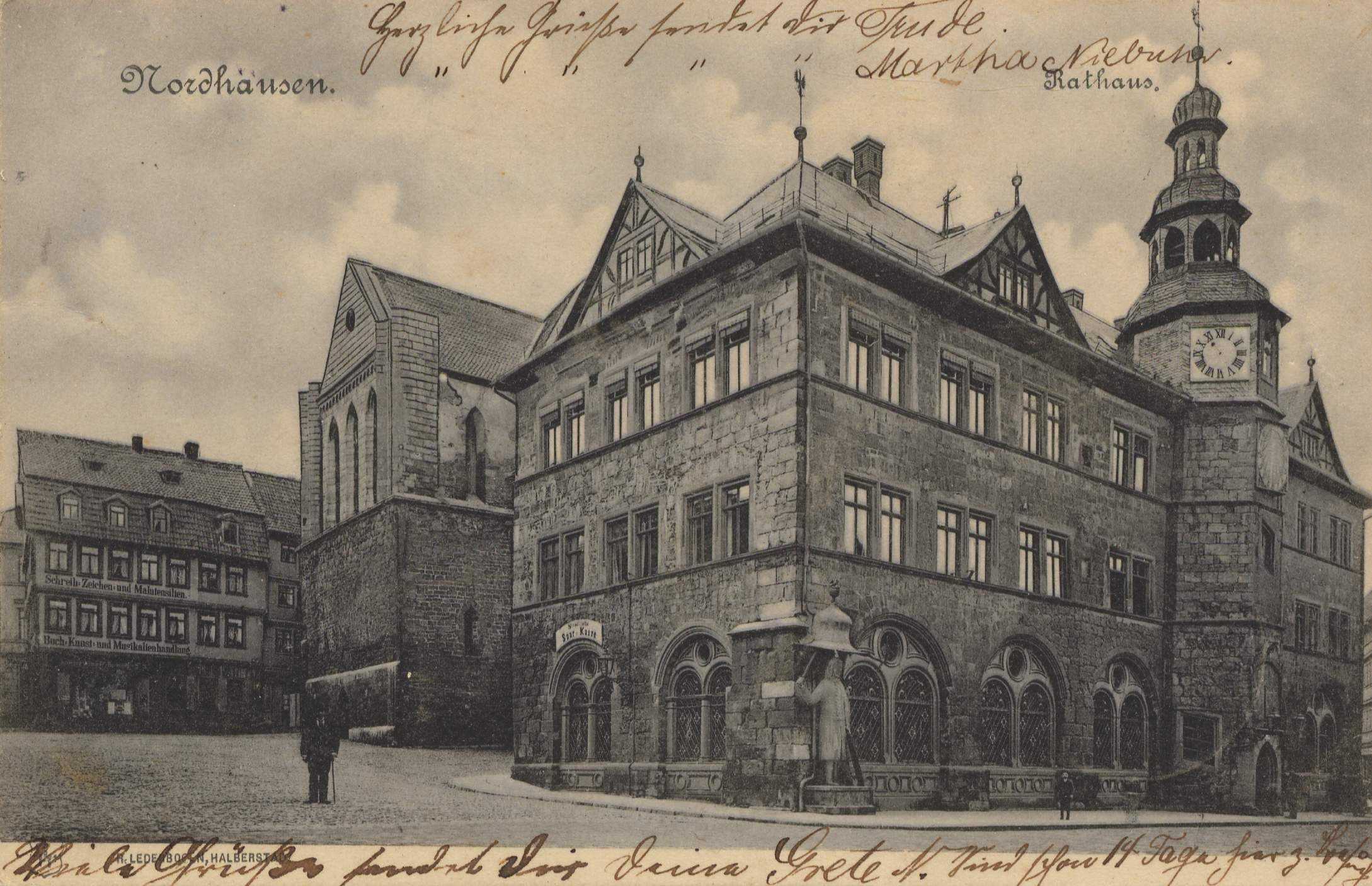 Ansicht des Nordhäuser Marktplatzes von Südwesten, Blick auf das Rathaus mit dem Roland , dahinter verdeckt, die St. Nikolaikirche (1945 zerstört)